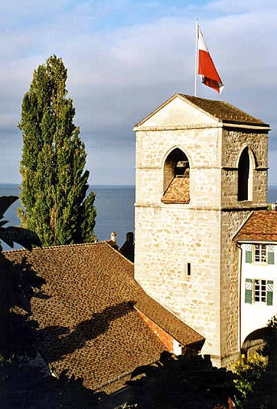 Kirche Saint-Symphorien in Saint-Saphorin (Lavaux).